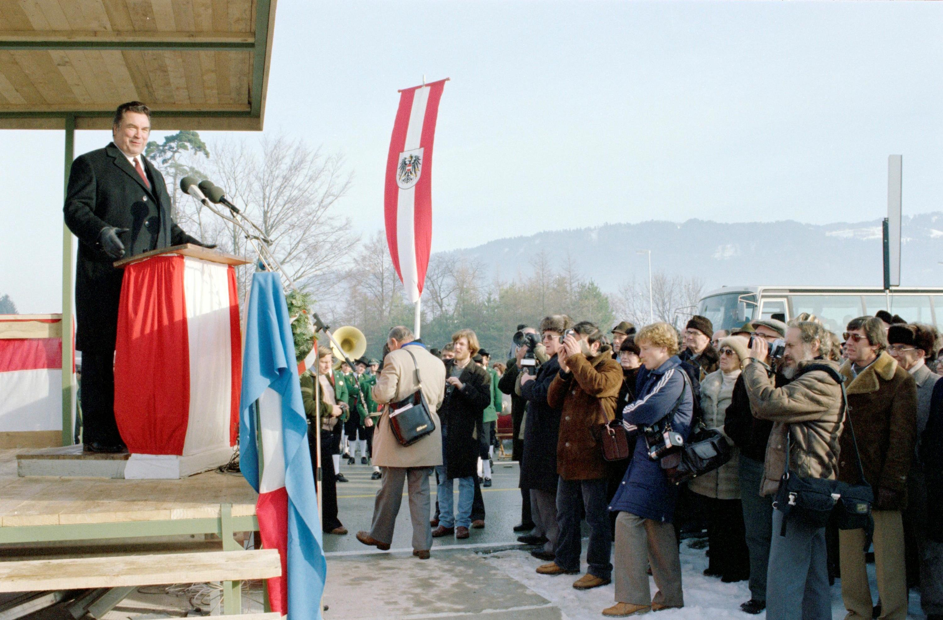 Helmut Wolf, Nationalratsabgeordneter der SPÖ, hält eine Rede anlässlich der Eröffnung des Pfändertunnels am 10. Dezember 1980.